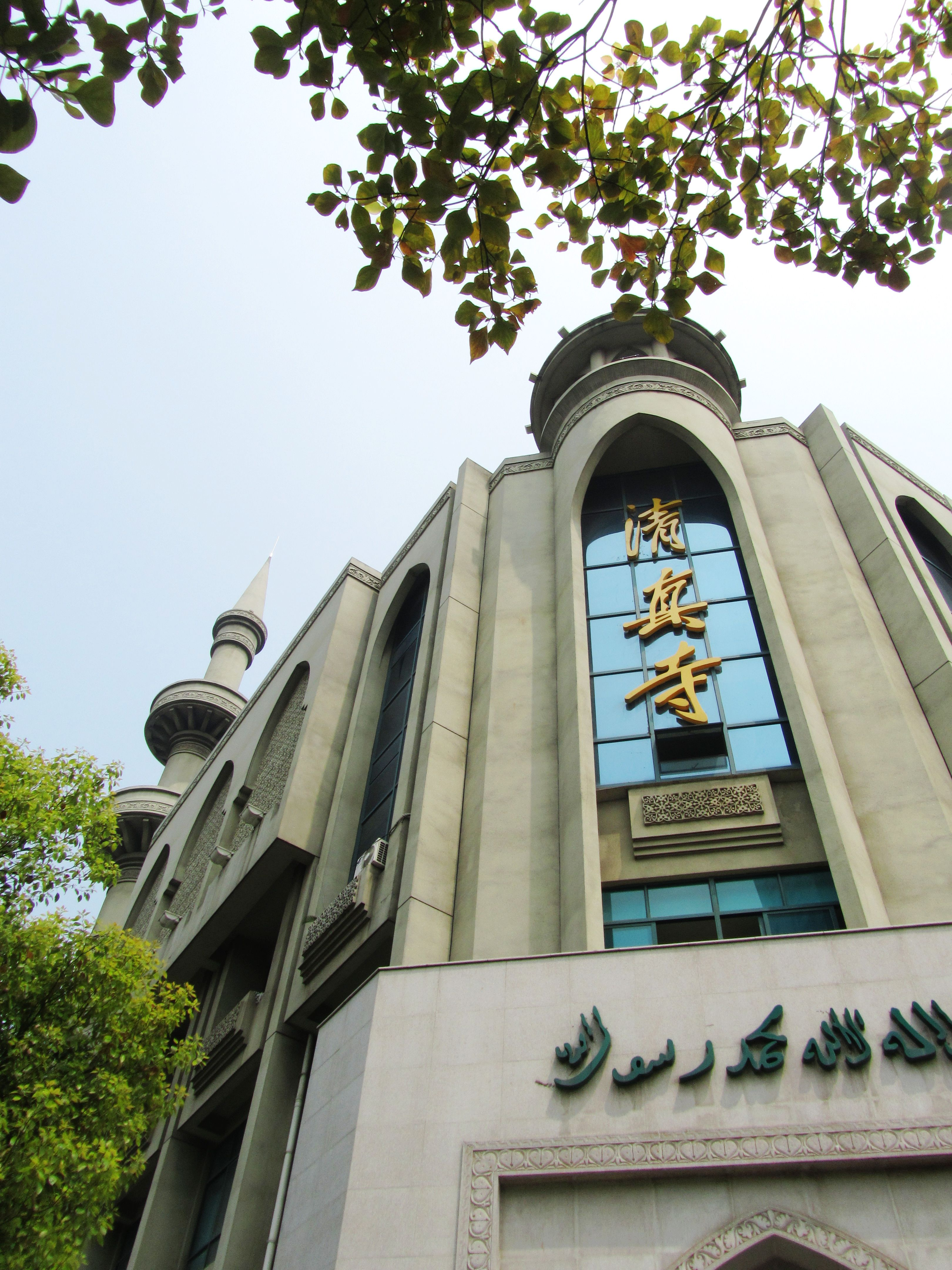 常州公园路清真寺。